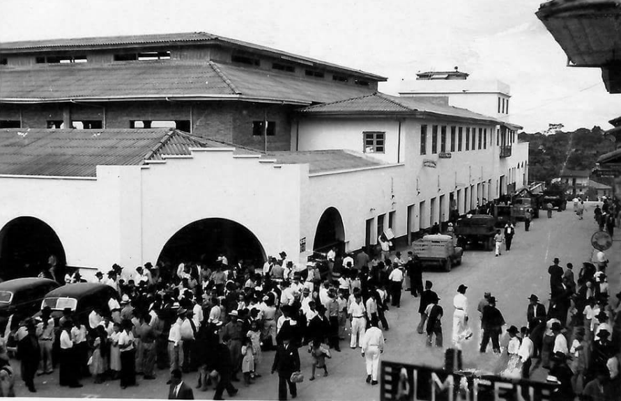 Galería de Calarcá, Quindío en los años 1950.